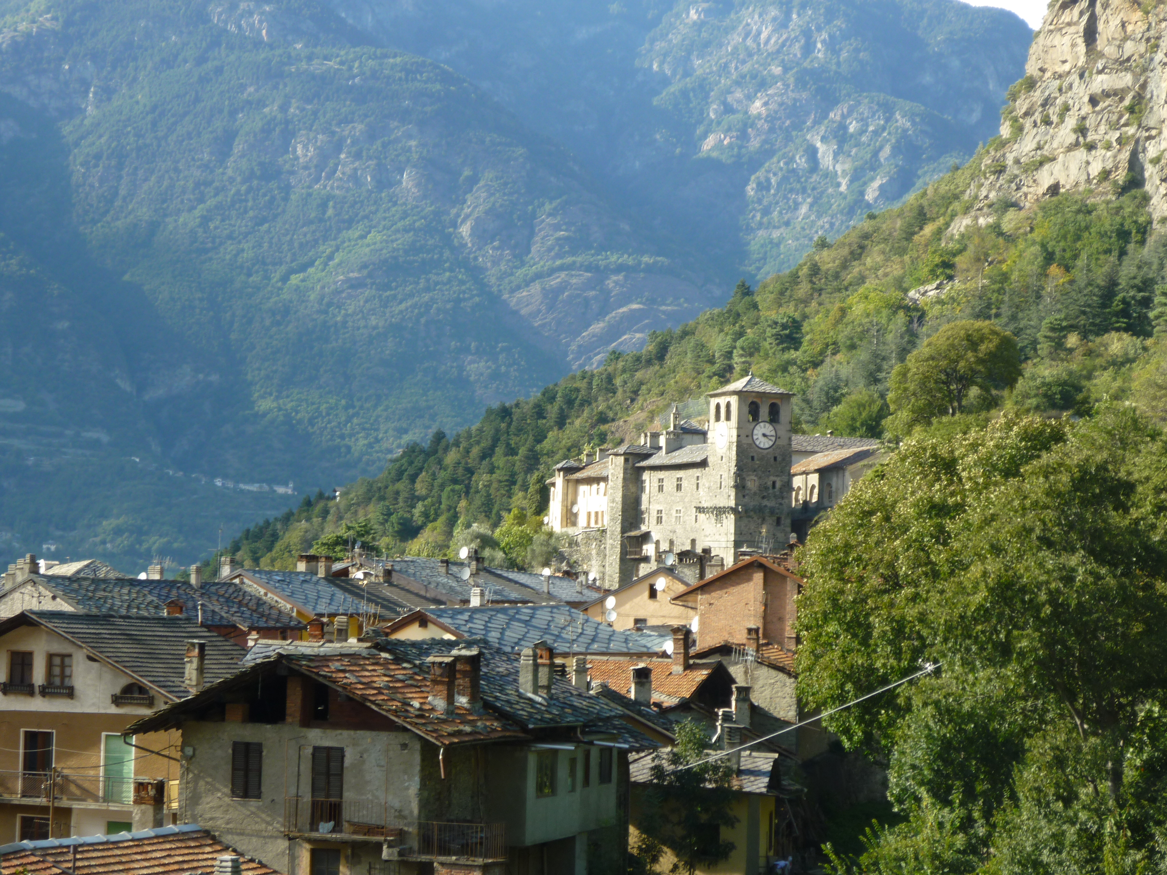 La prévôté de Saint-Gilles à Verrès (Vallée d'Aoste - Italie)